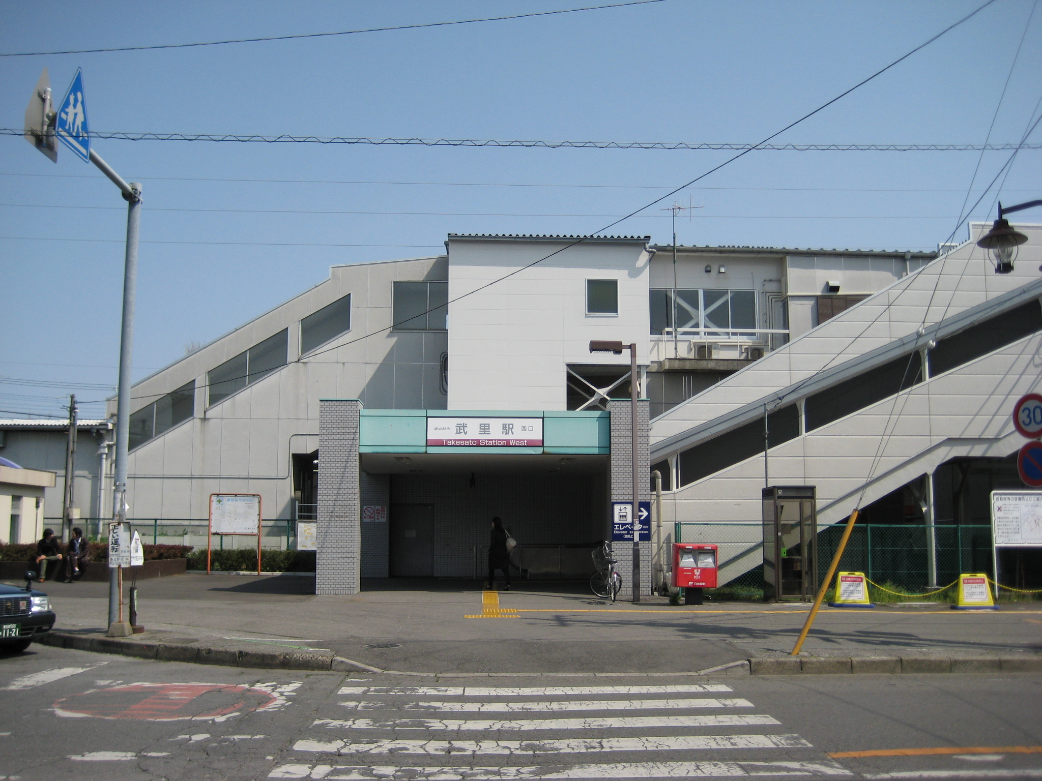 武里駅西口